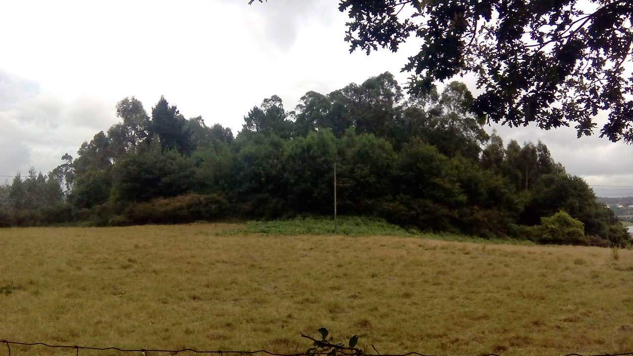 Vista do castro de Prismos, Maniños.